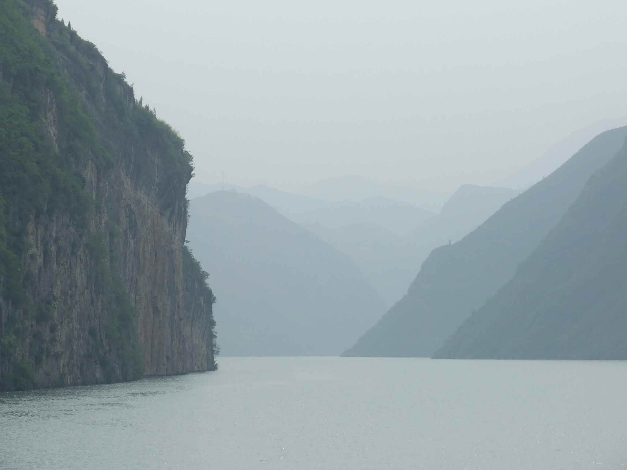 Yangzi wuxia gorge050